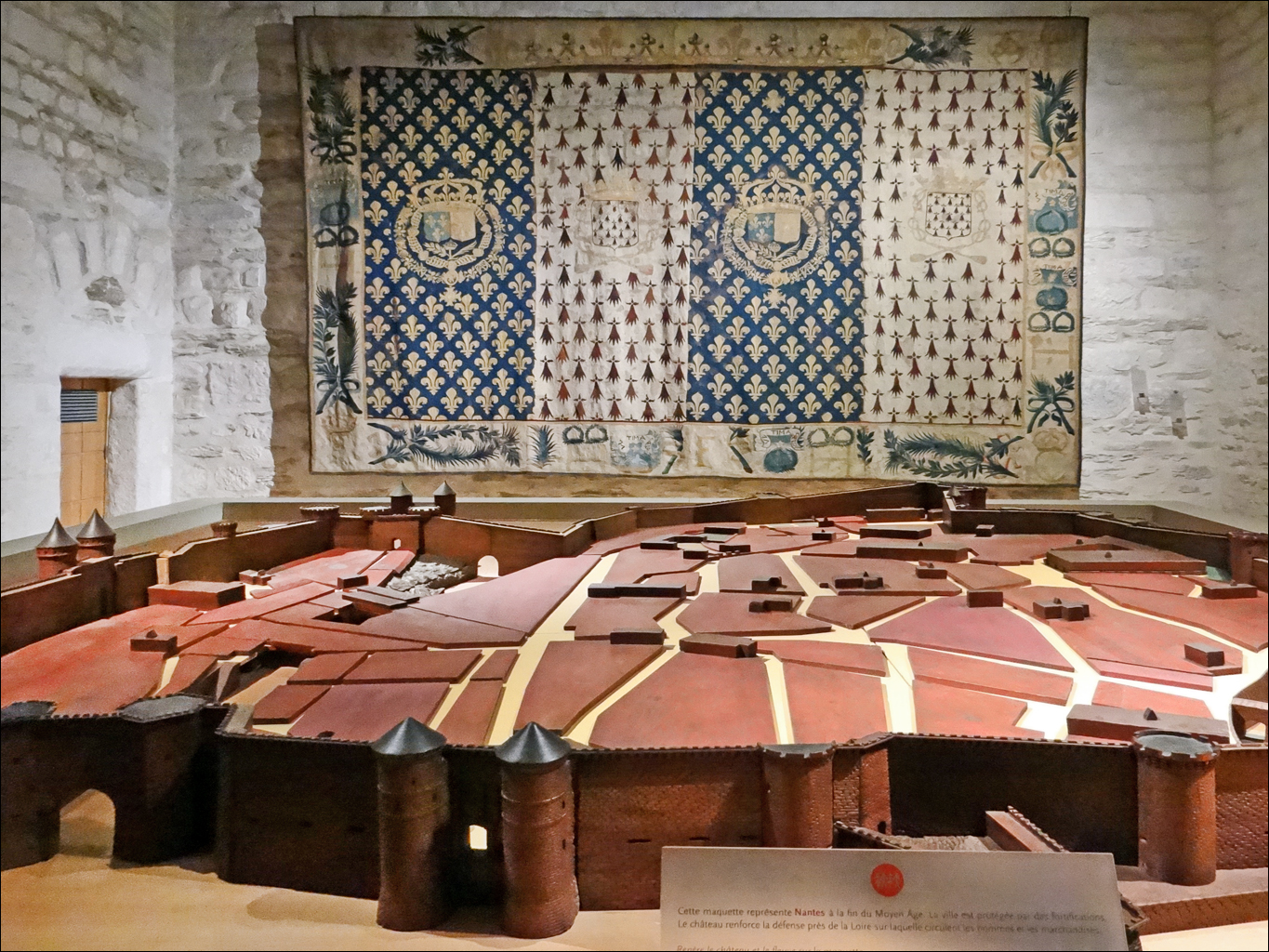 Maquette de Nantes à la fin du Moyen Âge La ville est protégée par des fortifications, le château renforce la défense près de la Loire. Au fond, sur le mur : la Tapisserie dite “des Etats de Bretagne” par Robert Paigné (1585) avec lys de France et hermines de Bretagne.